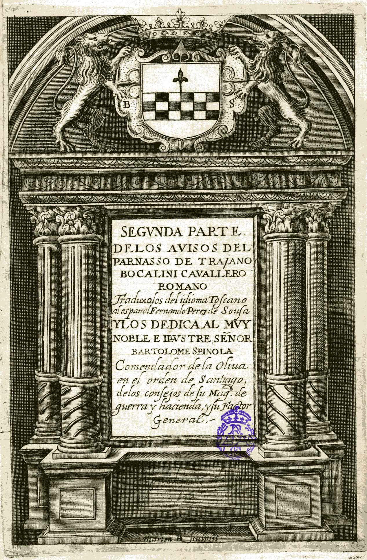 Segunda parte de los Avissos del Parnaso de Trajano Bocalini caballero romano/ traduxolos del idioma toscano al español Fernando Pérez de Sousa, s.a., portada calcográfica con escudo heráldico de Bartolomé Spínola